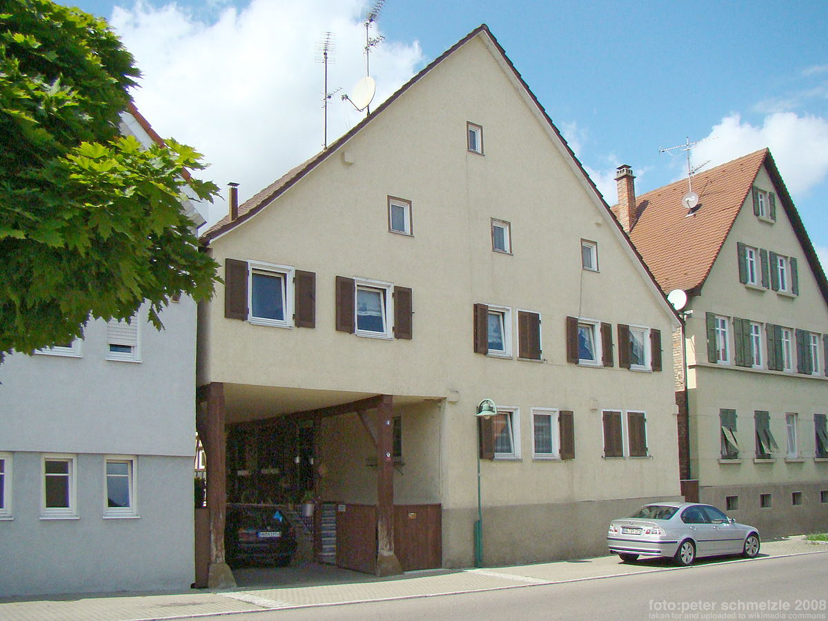 Denkmalgeschütztes Gebäude Rathausstr. 8 in Heilbronn-Böckingen